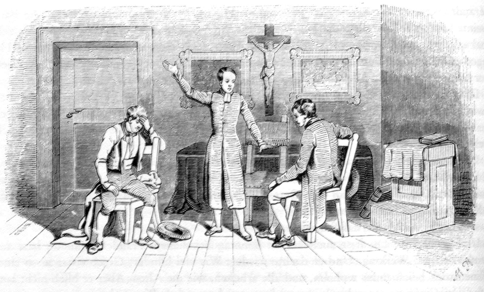 Berthold Auerbach, Schwarzwälder Dorfgeschichten, Die feindlichen Brüder, Zeichnung von Mathias Artaria, 1848. – „Wehe! Wehe! Wehe! ihr habt verstockten Herzens in Haß gelebt.“